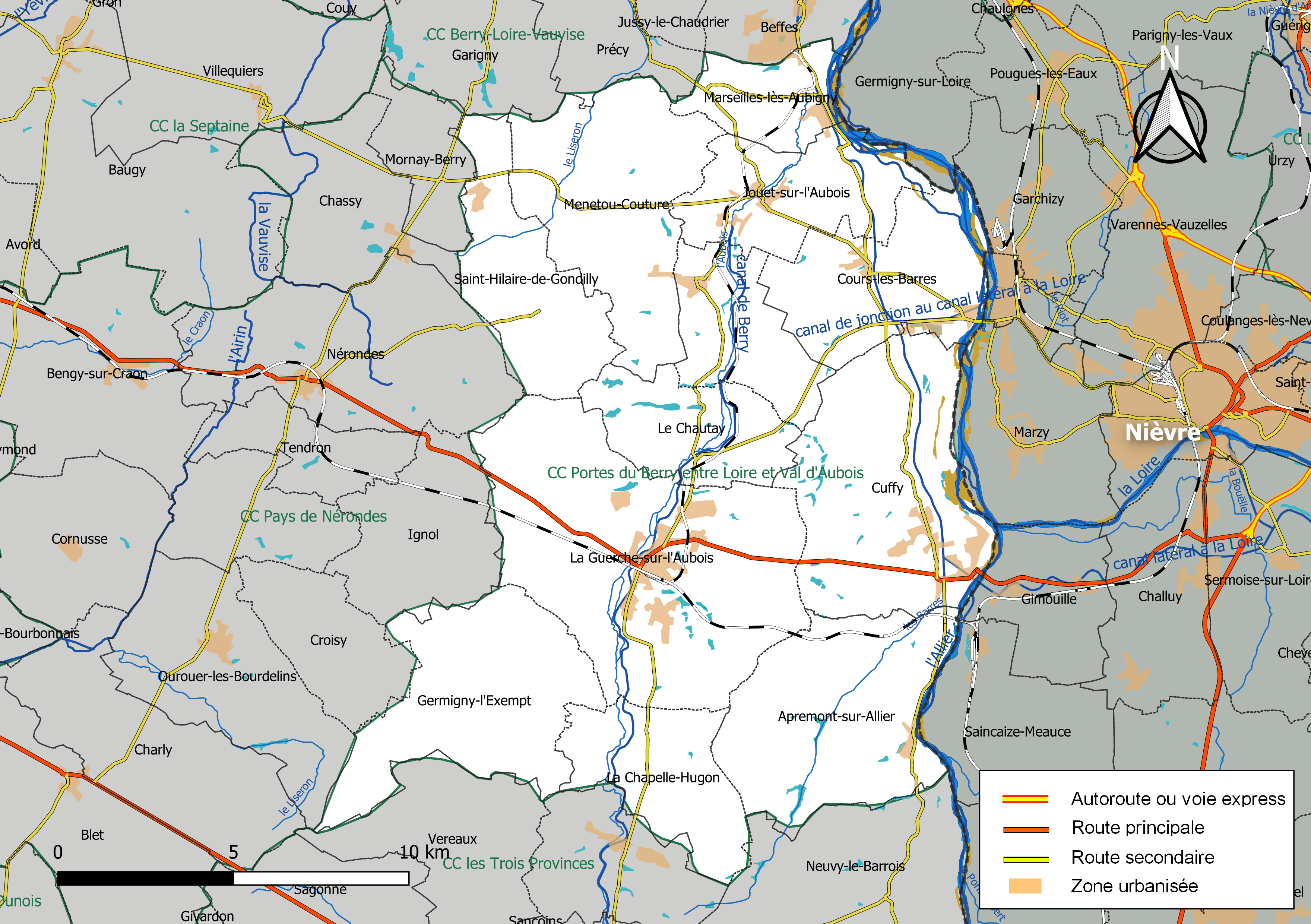 Carte géographique de la communauté de communes des Portes du Berry, entre Loire et val d'Aubois, département du Cher, France. Composition au 1er janvier 2019.